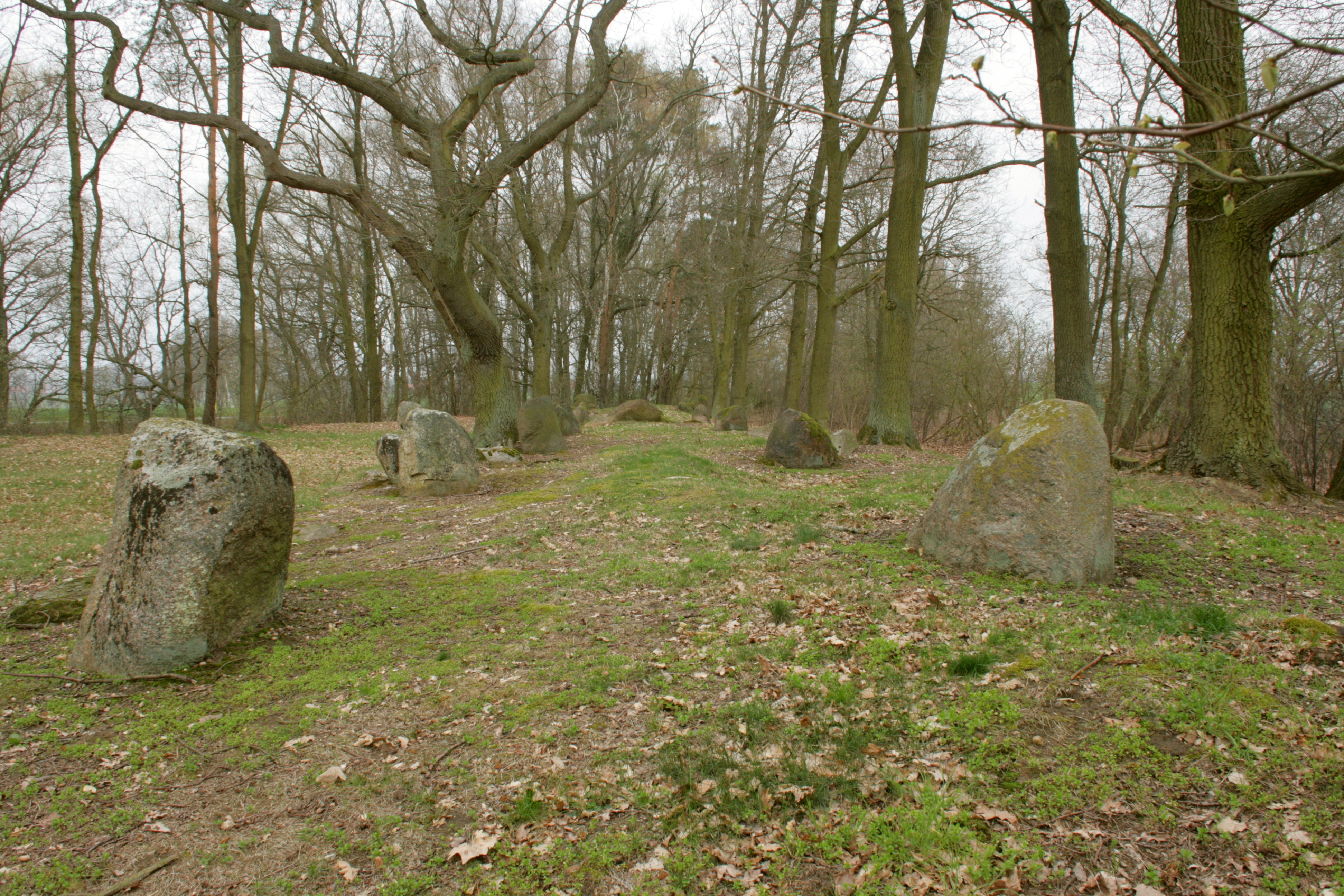 so genannte Königsgräber in Altenmedingen-Haaßel